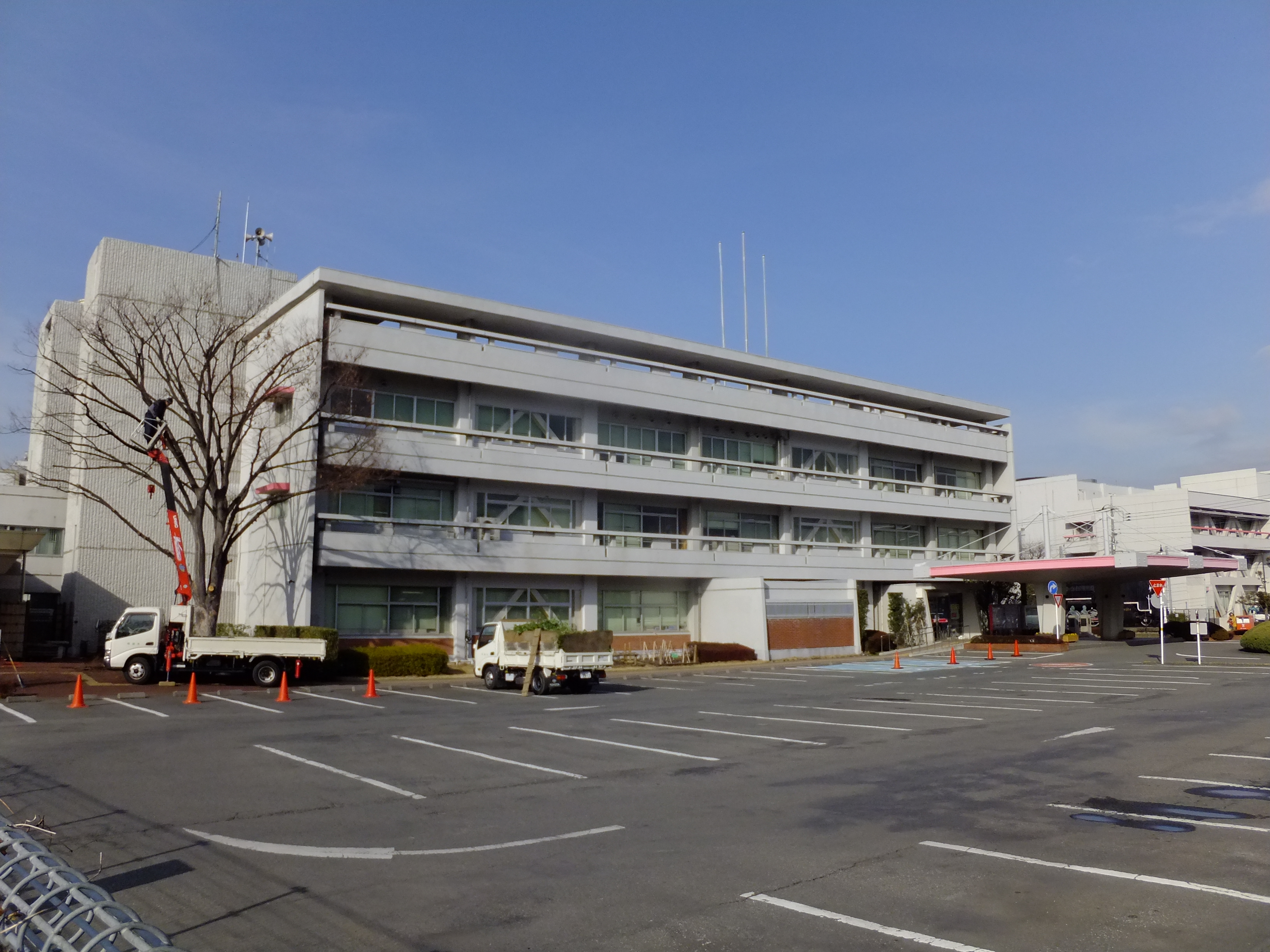 さいたま市中央区役所。もとの与野市役所をそのまま区役所としている。